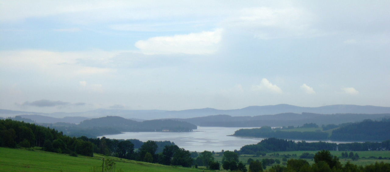 Vodní nádrž Lipno